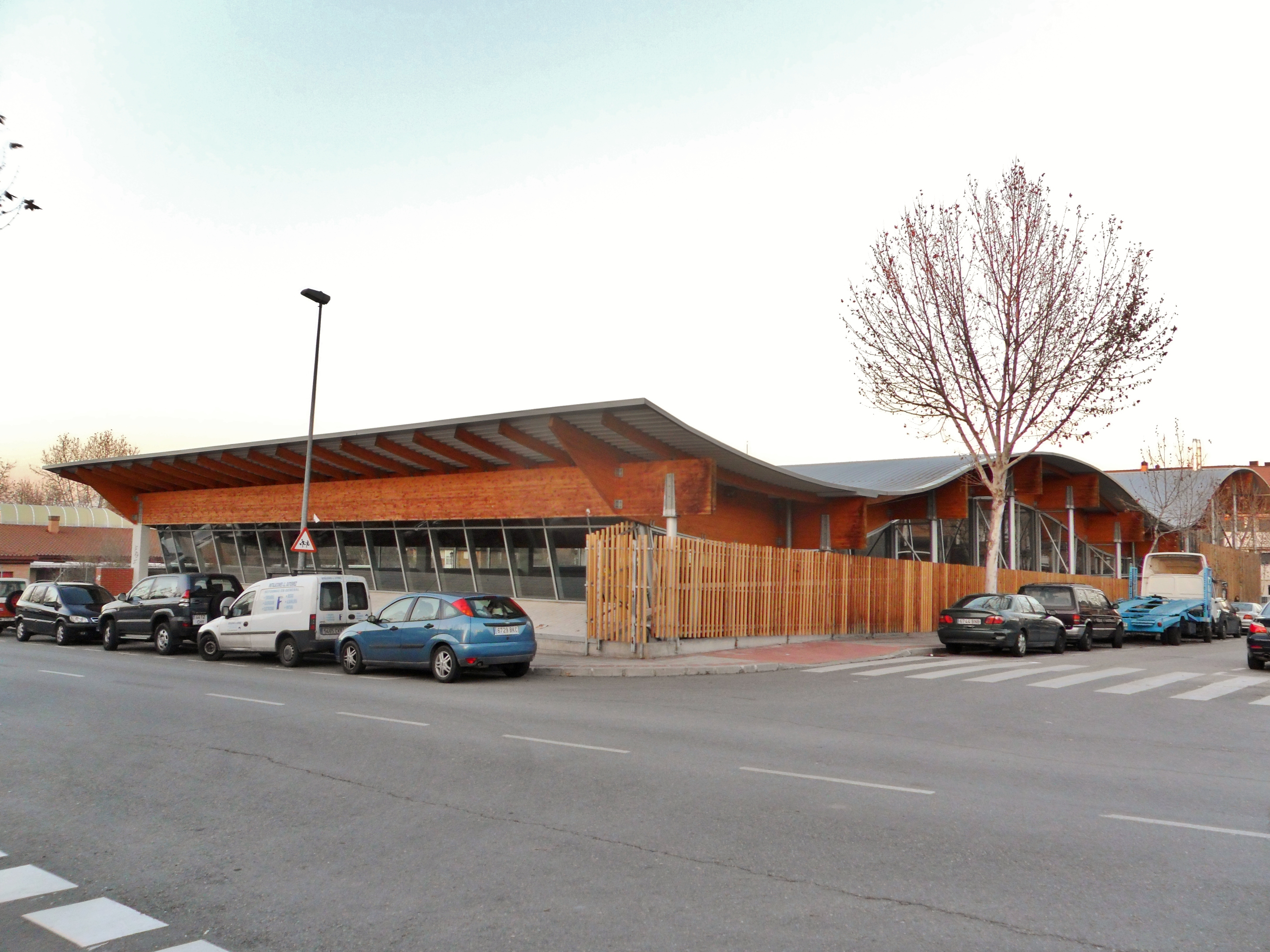 Piscina Jesús Rollán en Villanueva del Pardillo.